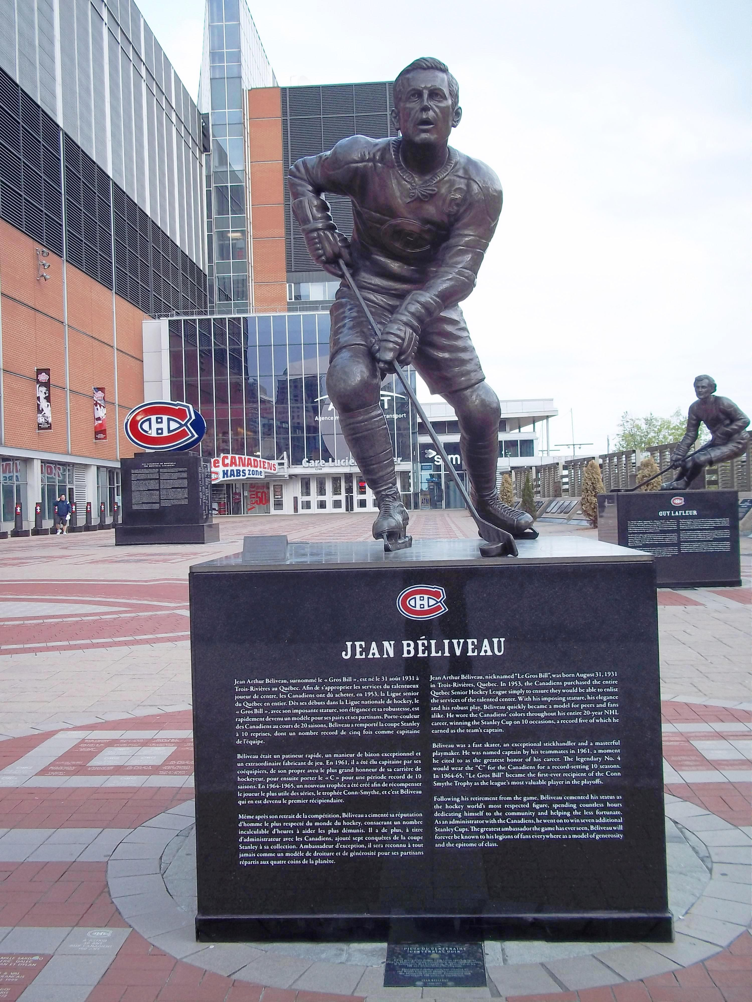 Statue de Jean Béliveau, Centre Bell, Montréal